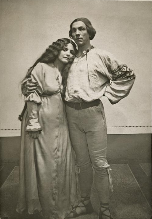 Eva Vrchlická a Rudolf Deyl, Princezna Pampeliška, ND 1910, režie Gustav Schmoranz